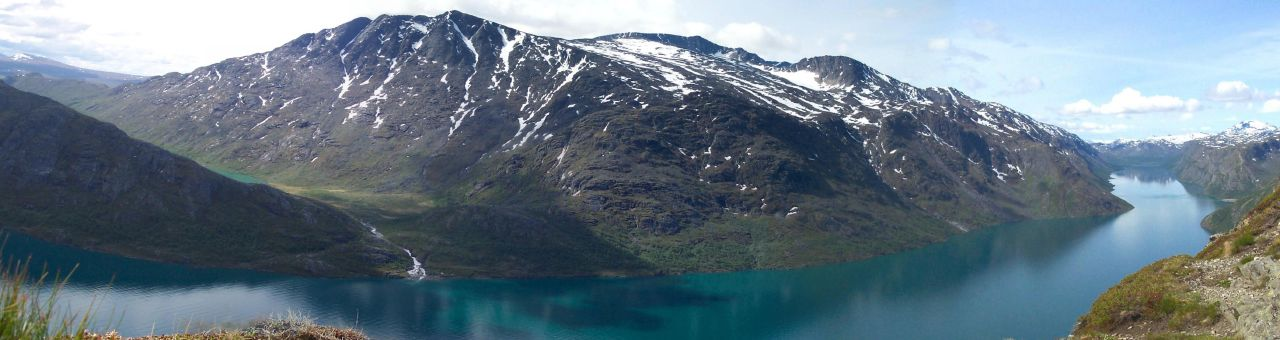 Leirungsdalen, Øvre Leirungen 1033 m and Bukkehåmåren 1910 m seen from Besseggen 1380 m. Also looking west across Gjende glacier lake 984 m towards Gjendebu 12 km away.